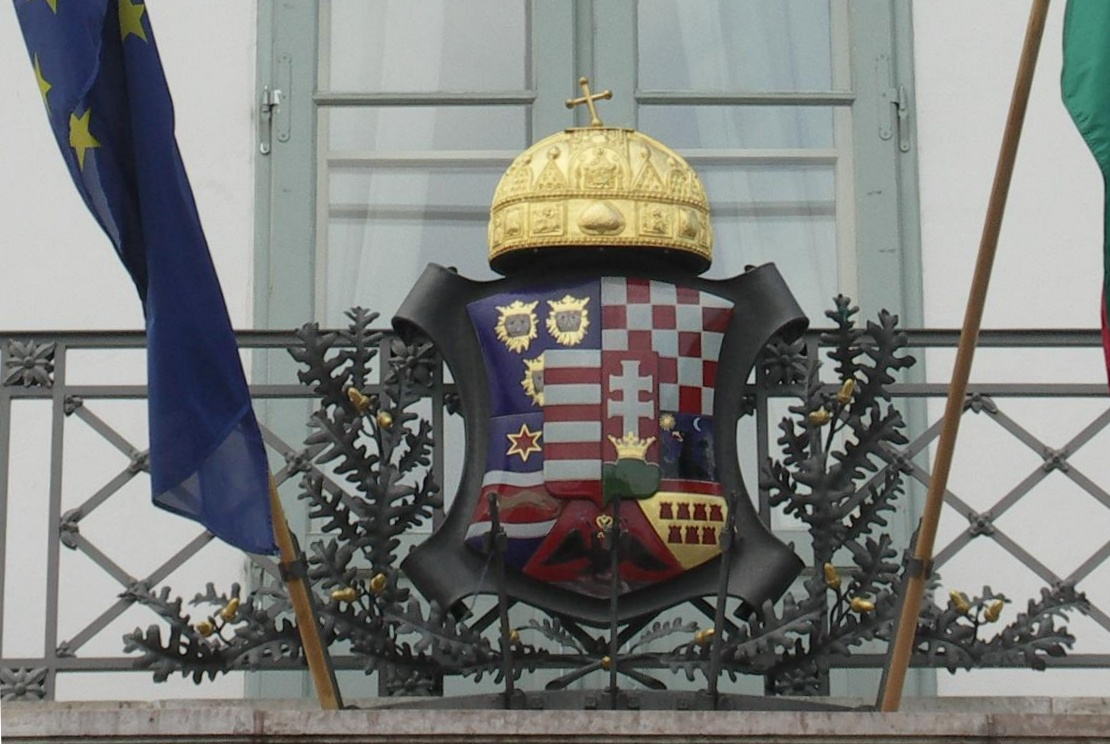 Középcímer a budai Sándor-palotán (budai vár, Sándor-palota déli erkélye)